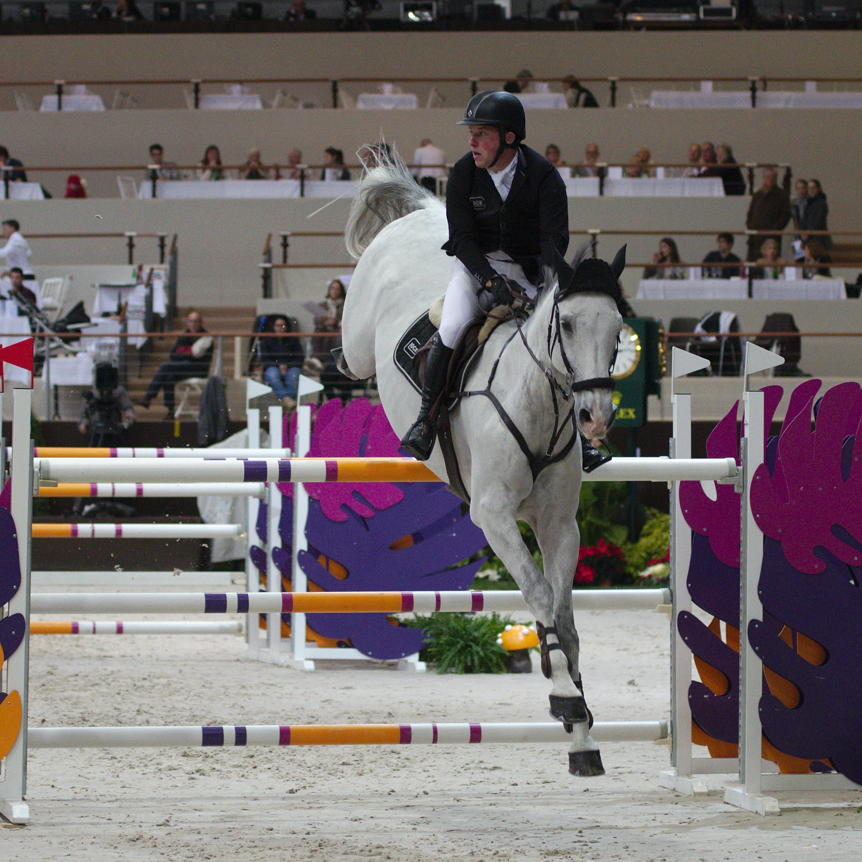 54eme CHI de Genève - 20141213 - Coupe de Genève - Gerco Schröder et Glock's Cognac Champblanc